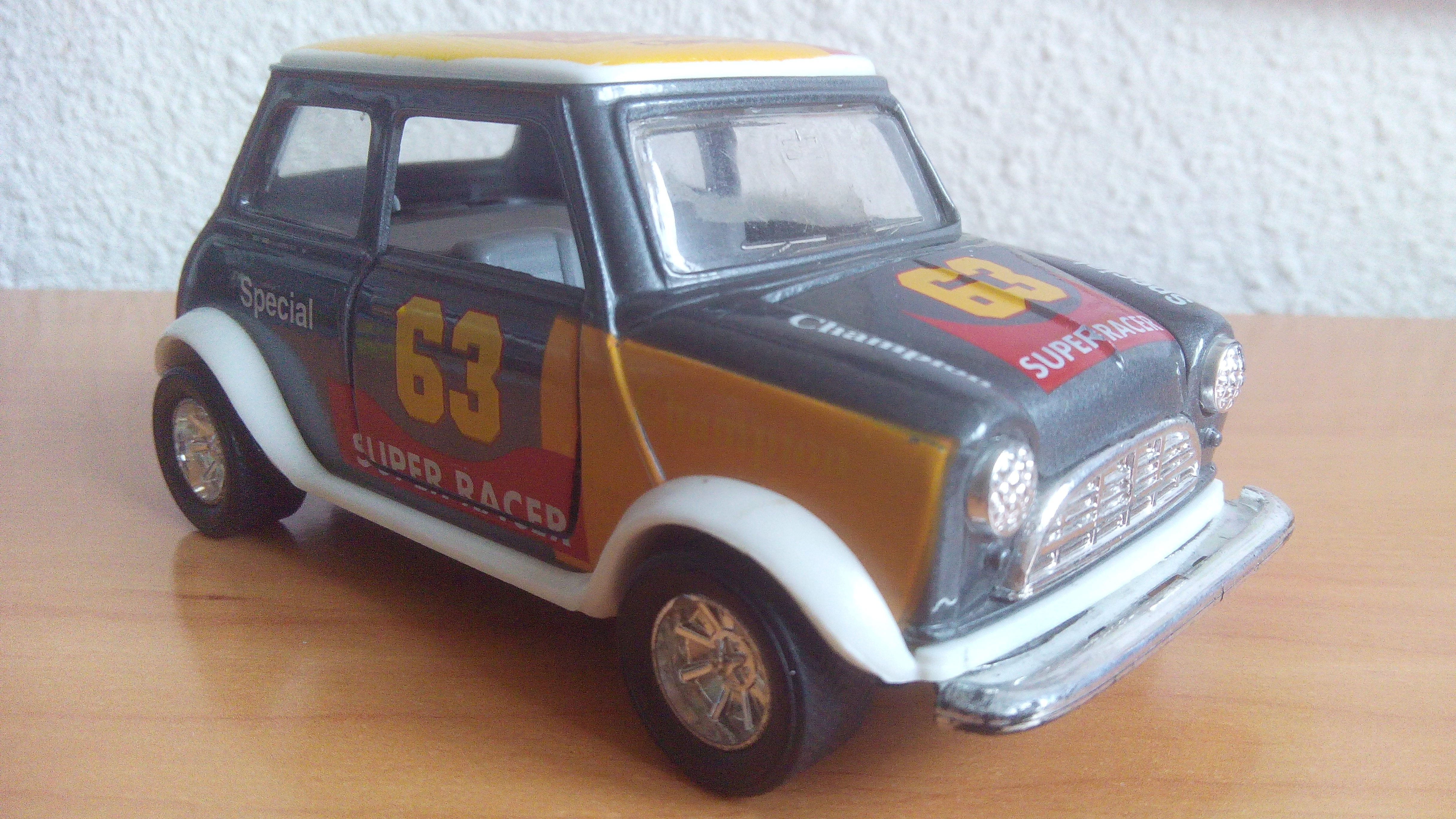 Mini